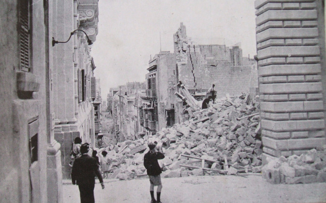 Ruine de l'auberge de France 2 à La Valette